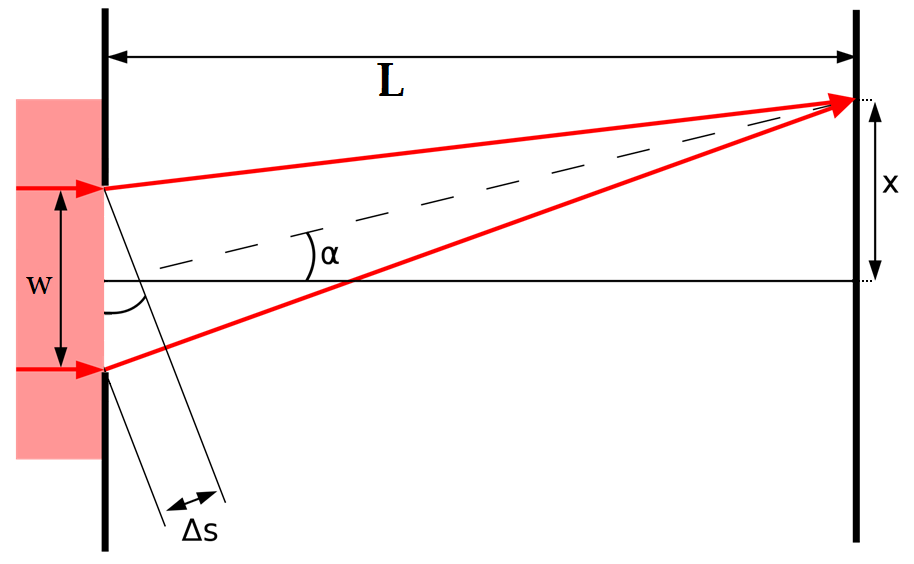 Tek yarıkta girişim